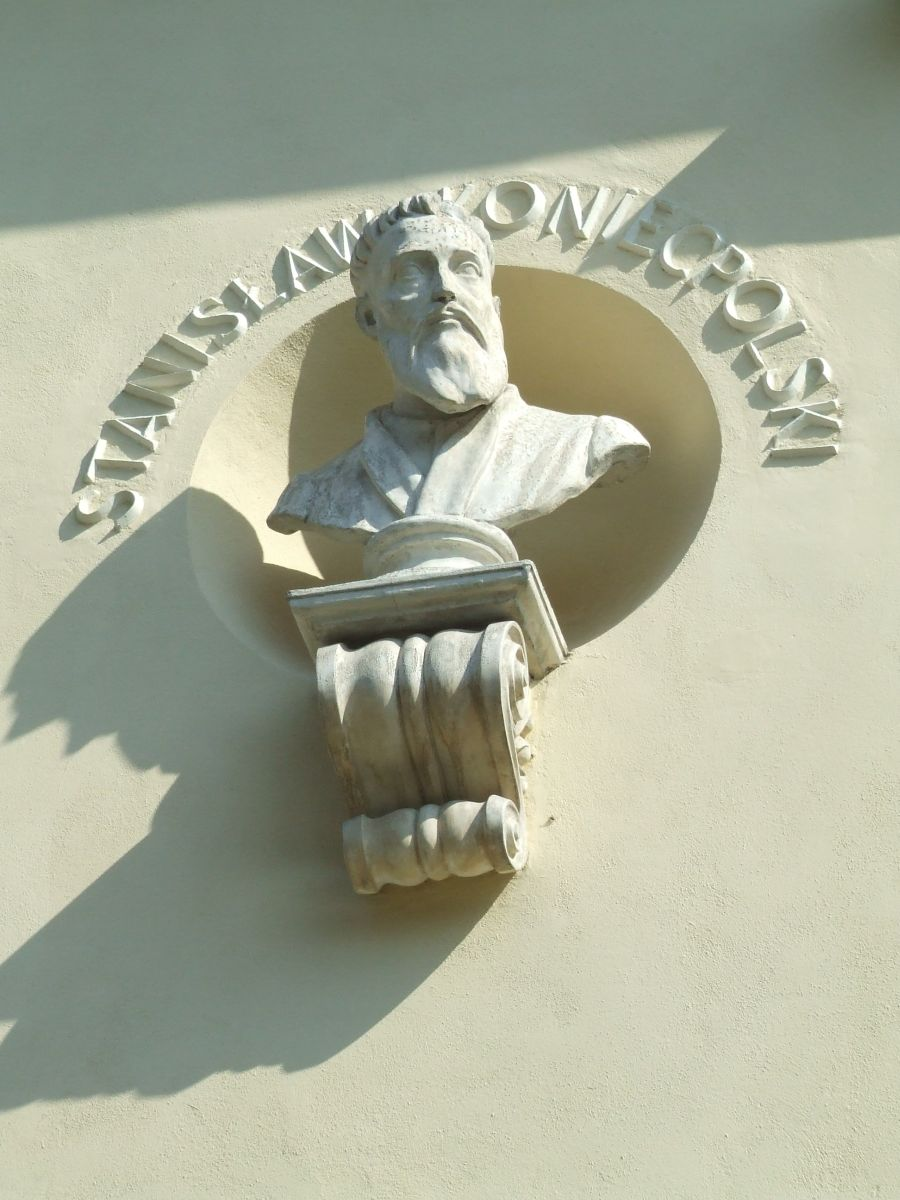 Pałac Juliana Ursyna Niemcewicza, obecnie rektorat SGGW, popiersie Stanisława Koniecpolskiego na elewacji pałacu